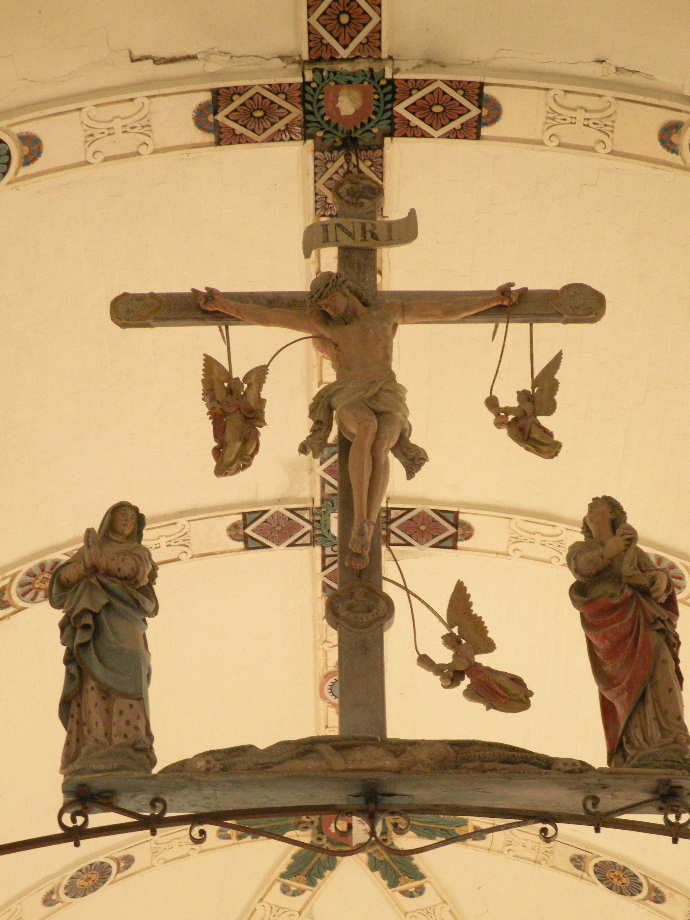 Intérieur de l'église Saint-Pierre et Saint-Paul de Jouy-sous-Thelle